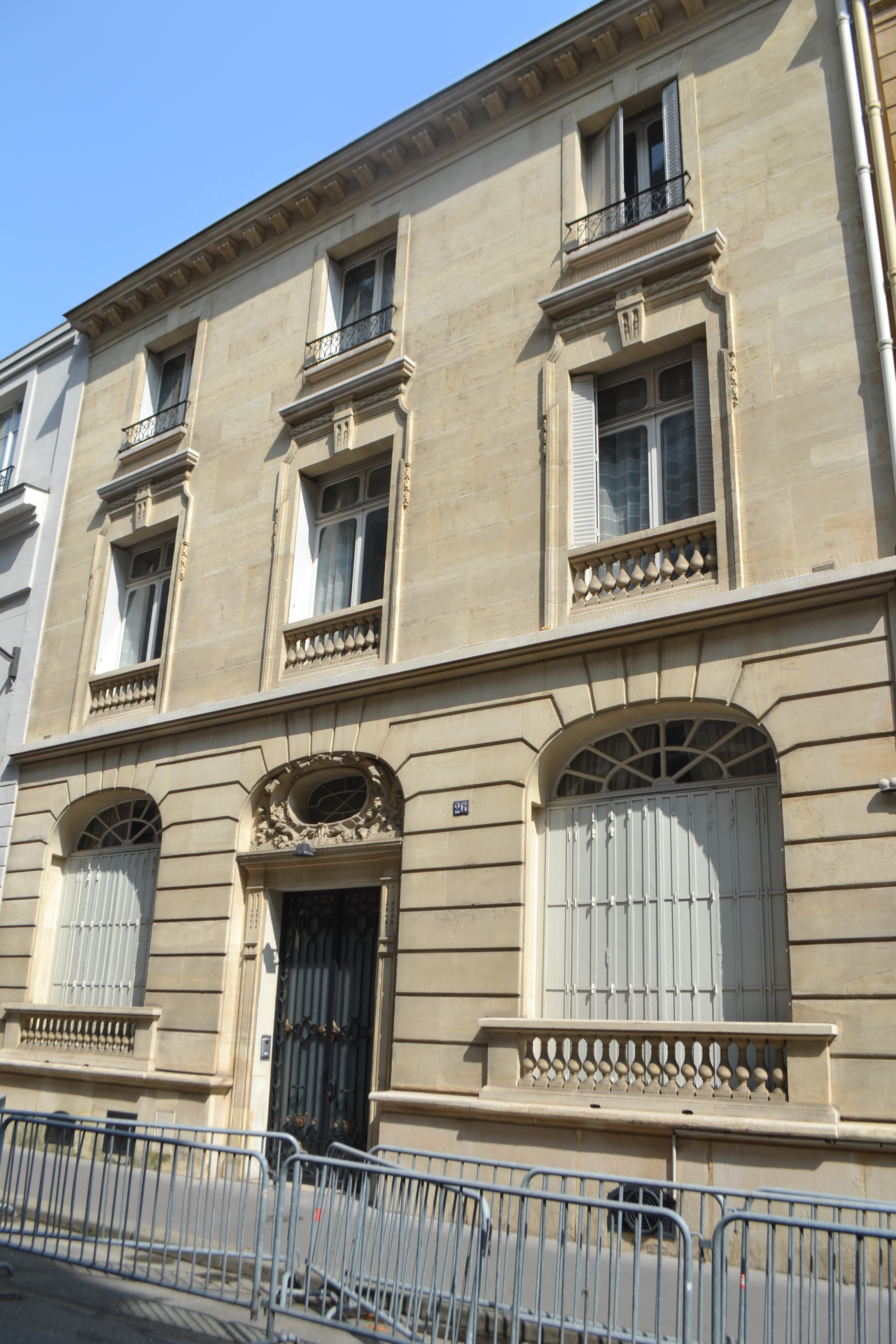 26 rue Marbeau, Paris 16e : dernière demeure de Raymond Poincaré (1860-1934).